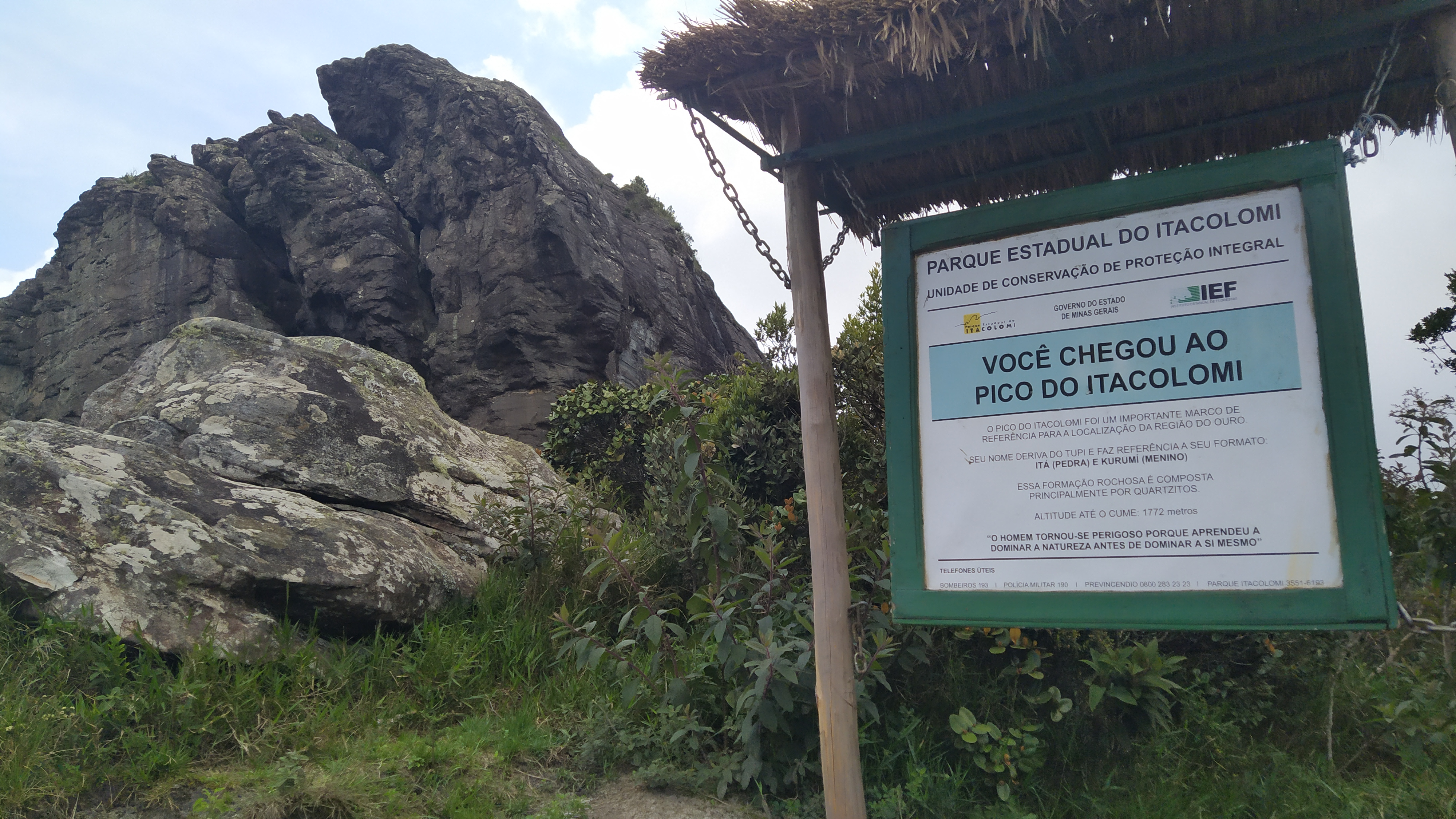 Pico do Itacolomi e placa de informações no Parque Estadual do Itacolomi de nível Estadual, localizado em Mariana (MG), Ouro Preto (MG)